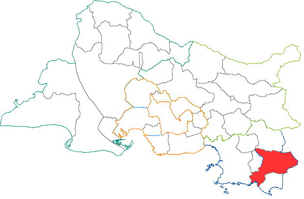 Situation du canton dans le département des Bouches-du-Rhône (France)